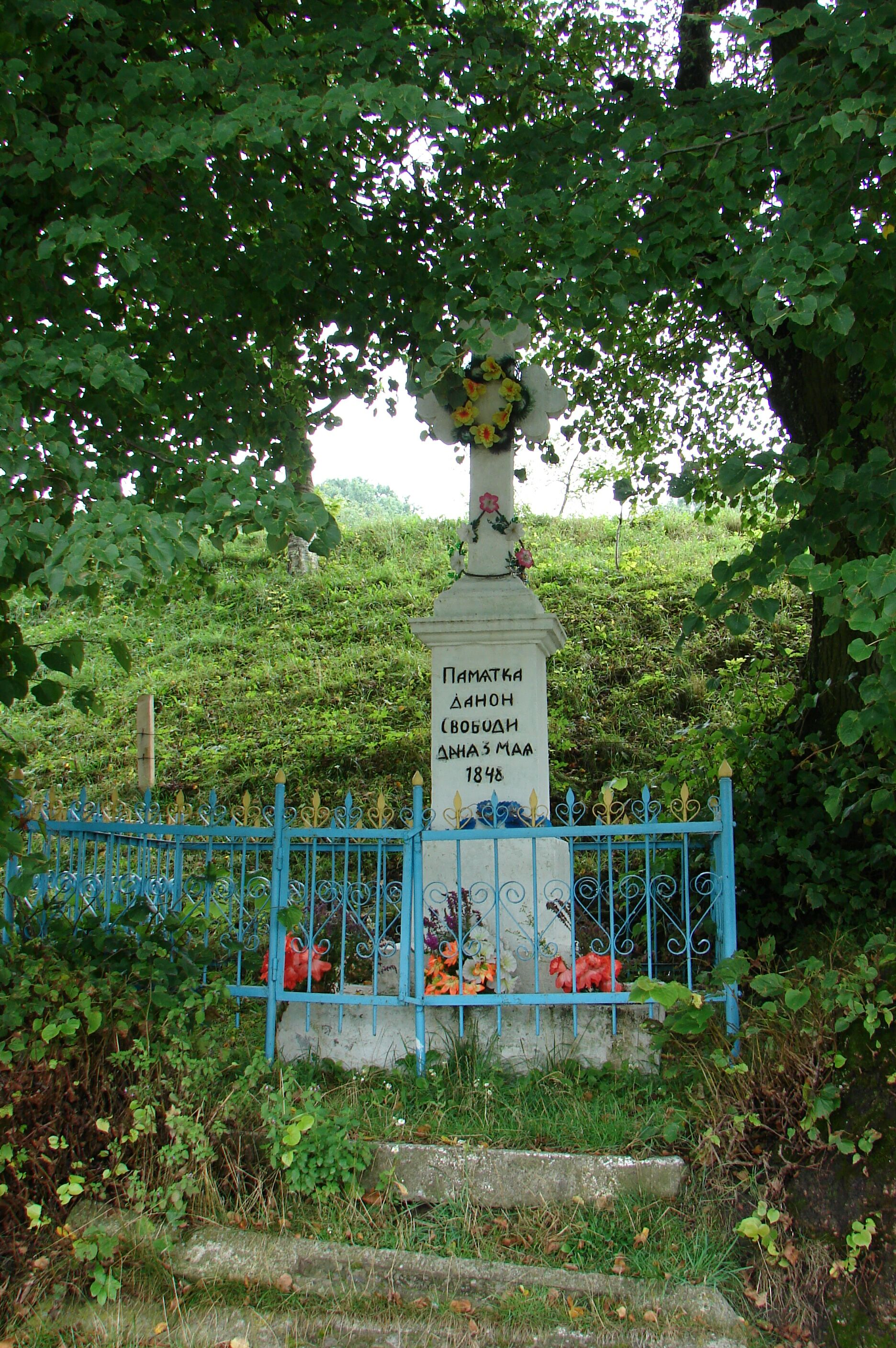 Пам'ятний хрест: Хрест встановлений в с.Підмонастир на честь відміни кріпосного права в Австро-Угорщині. За часів радянської окупації хрест було перенесено на цвинтар, що довзолило його вберегти. Після здобуття незалежності Україною пам'ятний хрест "Памятка Даной Свободи" знову встановлено на його історичне місце.